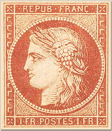 Cérès vermillion 1 F., 1849.